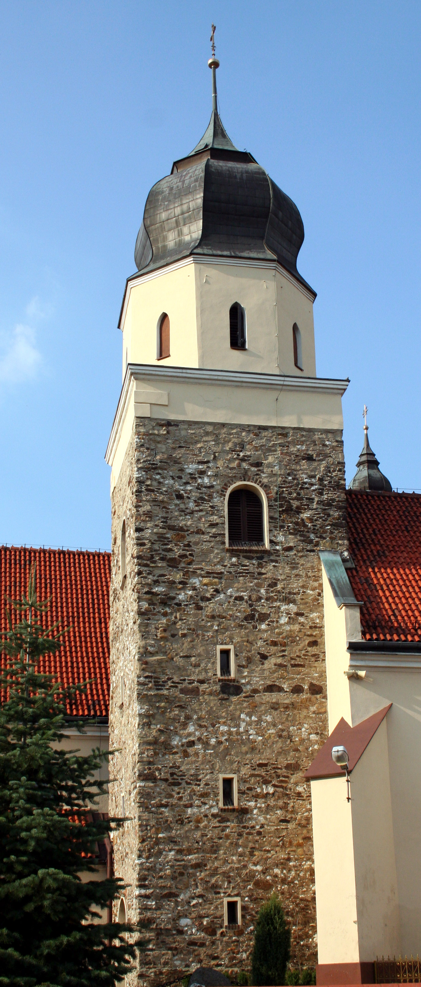 wieża kościoła św. Jakuba Starszego Apostoła w Lubszy, gmina Woźniki, powiat lubliniecki